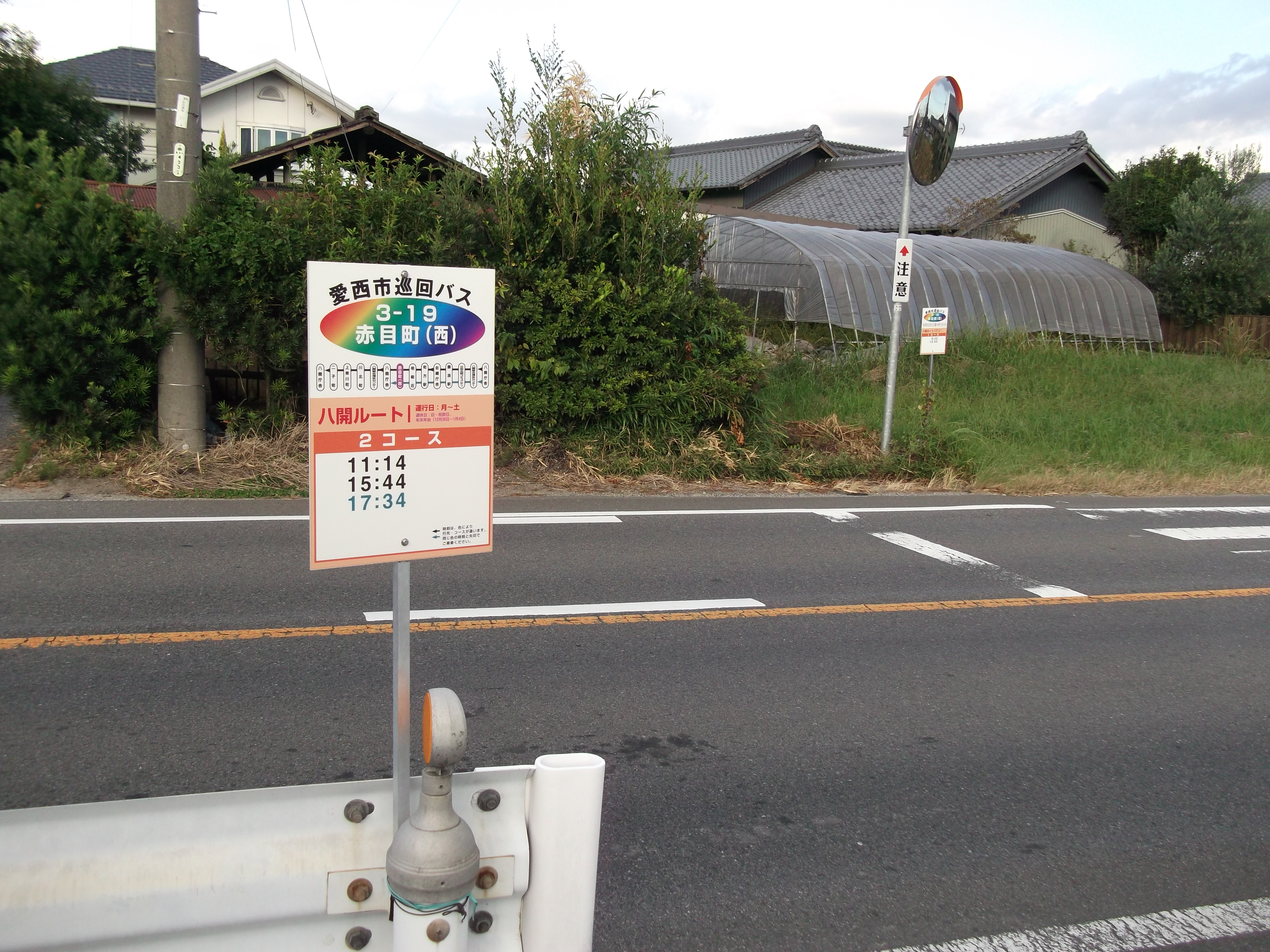 愛西市赤目町の愛西市巡回バス「赤目町（西）」停留所を東側より撮影